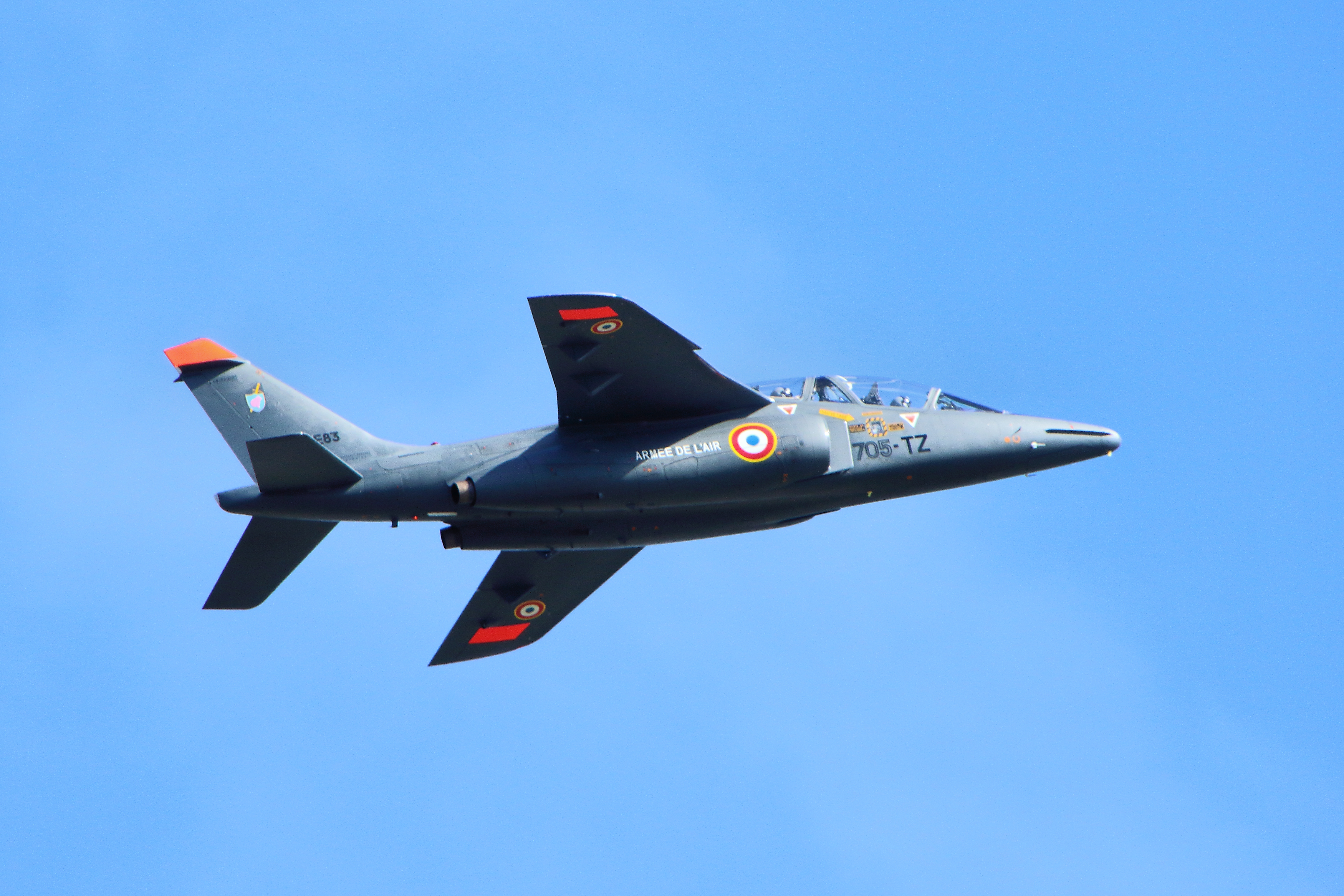 Alpha Jet, Escadron d'instruction en vol 3/13 Auvergne - RAF Mildenhall